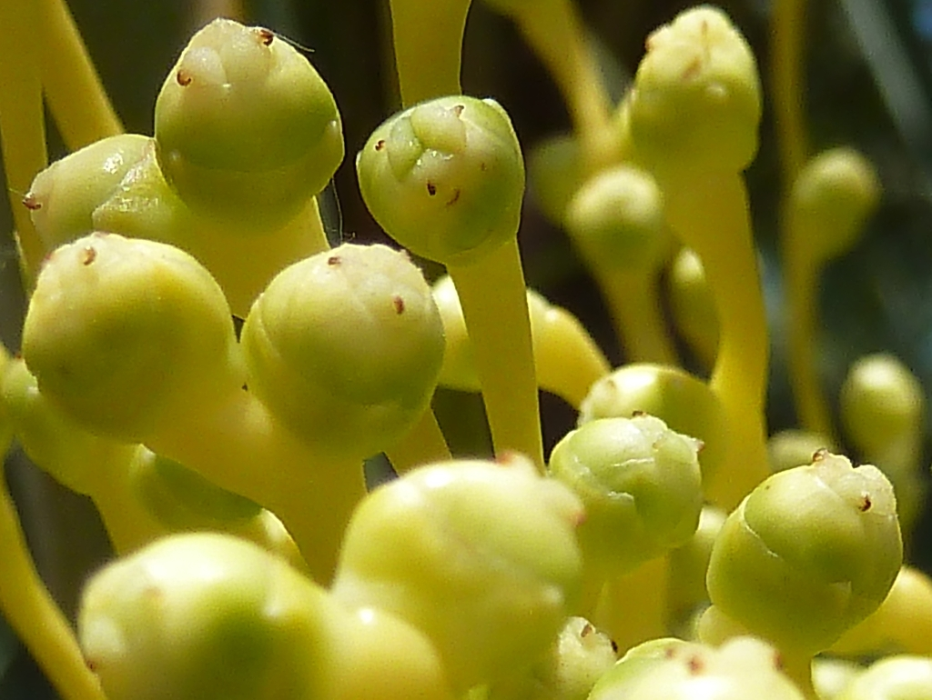 Phoenix dactylifera (Palmera datilera) : flores hembra - La Huerta, Albatera (Alicante, España).